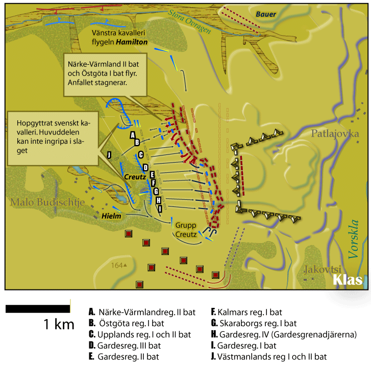 Illustration: Klas Sandberg. Källa: Karl XII på slagfältet